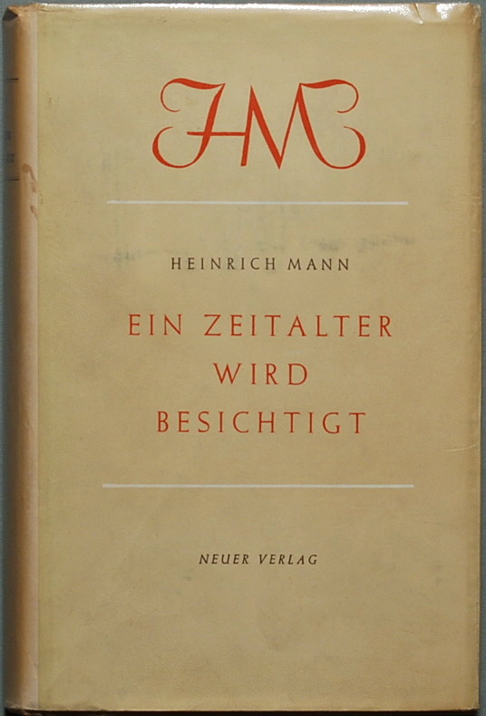 Mann, Heinrich: Ein Zeitalter wird besichtigt. Stockholm: Neuer Verlag 1946, 560 Seiten. Erstdruck (Wilpert/Gühring² 89)